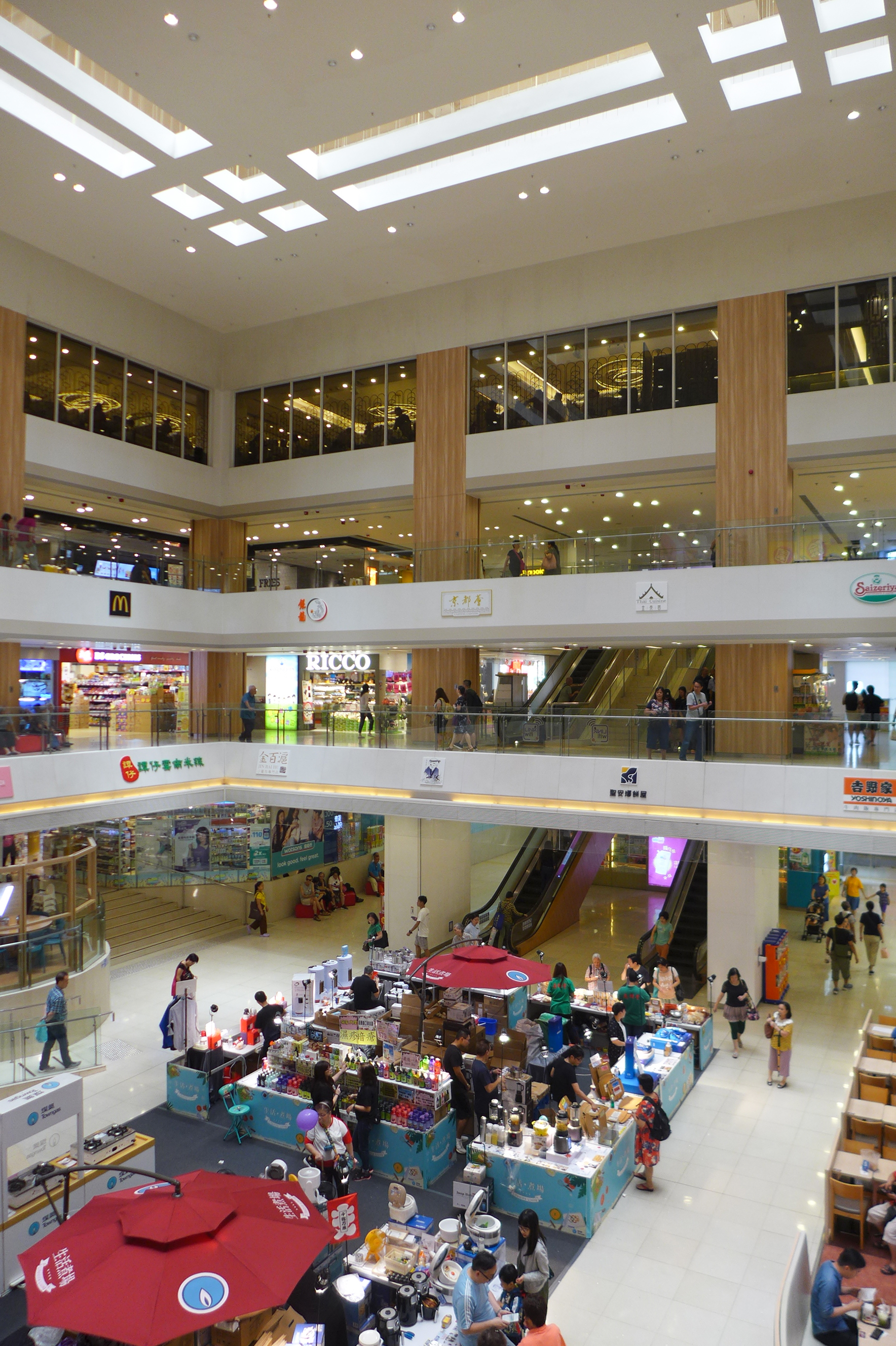 Cheung Fat Plaza Atrium